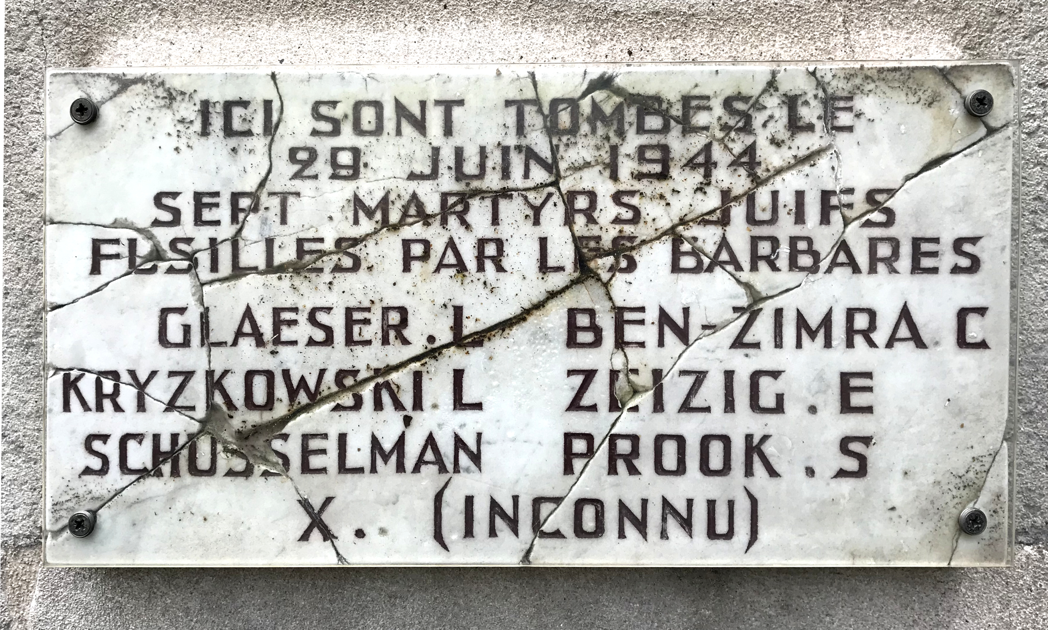 Façade du Centre d'histoire de la résistance et de la déportation à Lyon (Centre Berthelot) : plaque initialement apposée sur le mur du cimetière de Rillieux, vandalisée en mai 1994, réparée et installée au CHRD.